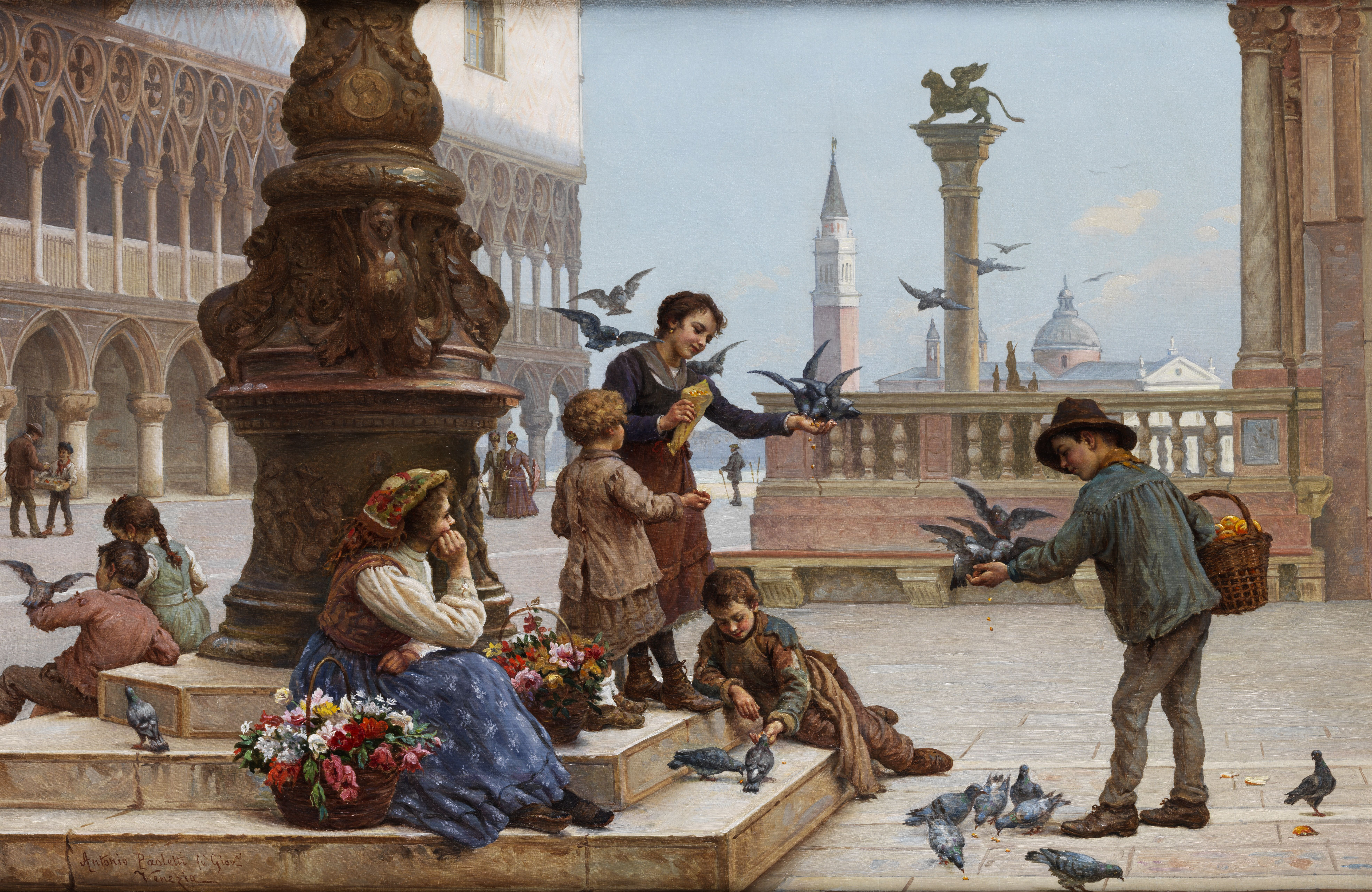 Tauben fütternde Kinder in Venedig